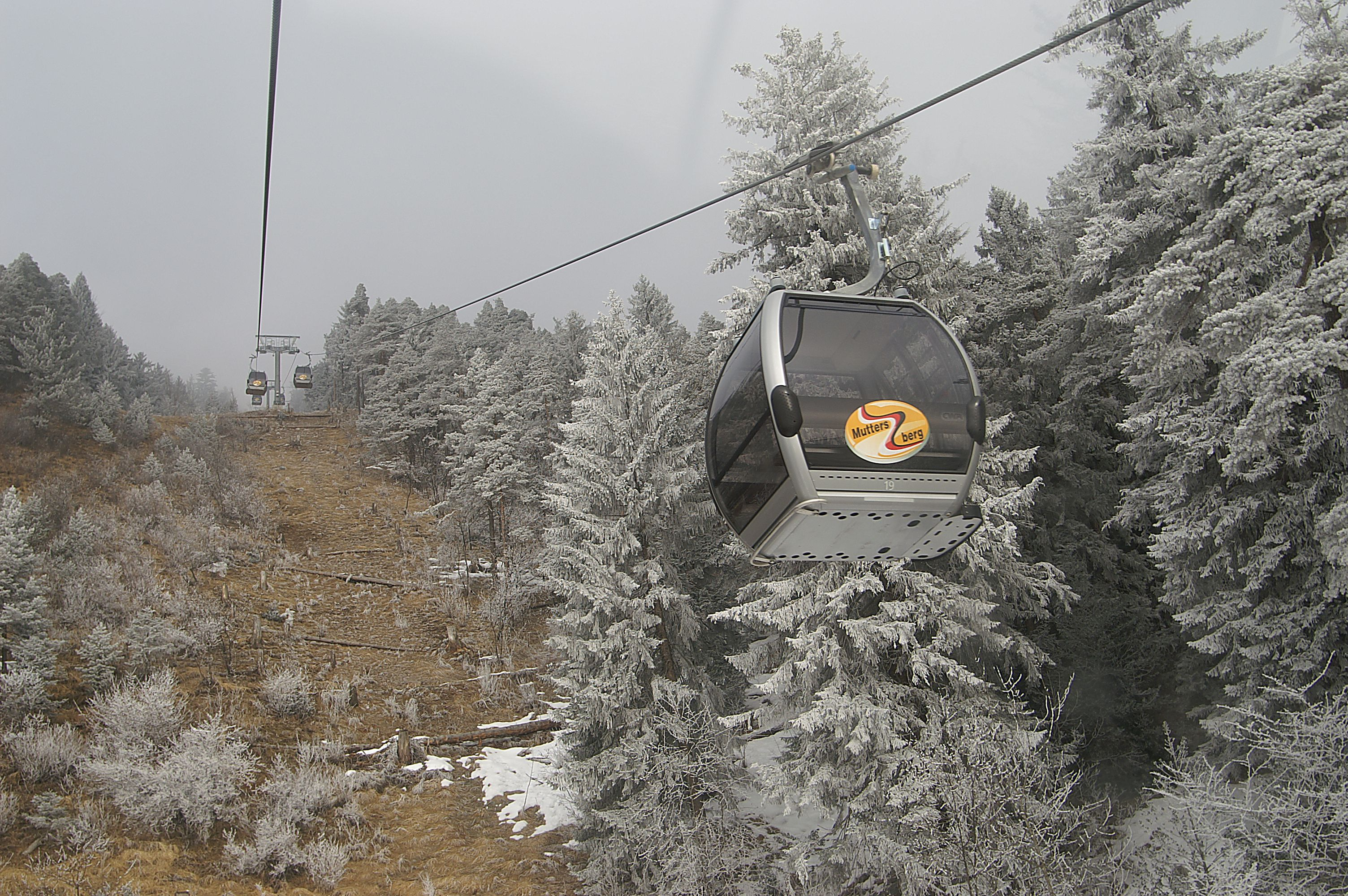 die Muttersbergbahn in Bludenz, Vorarlberg.